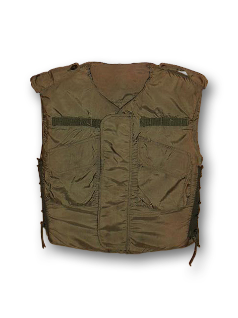 amerikanische "Flack Jacket" M52 aus dem Vietnamkrieg (US-Army)